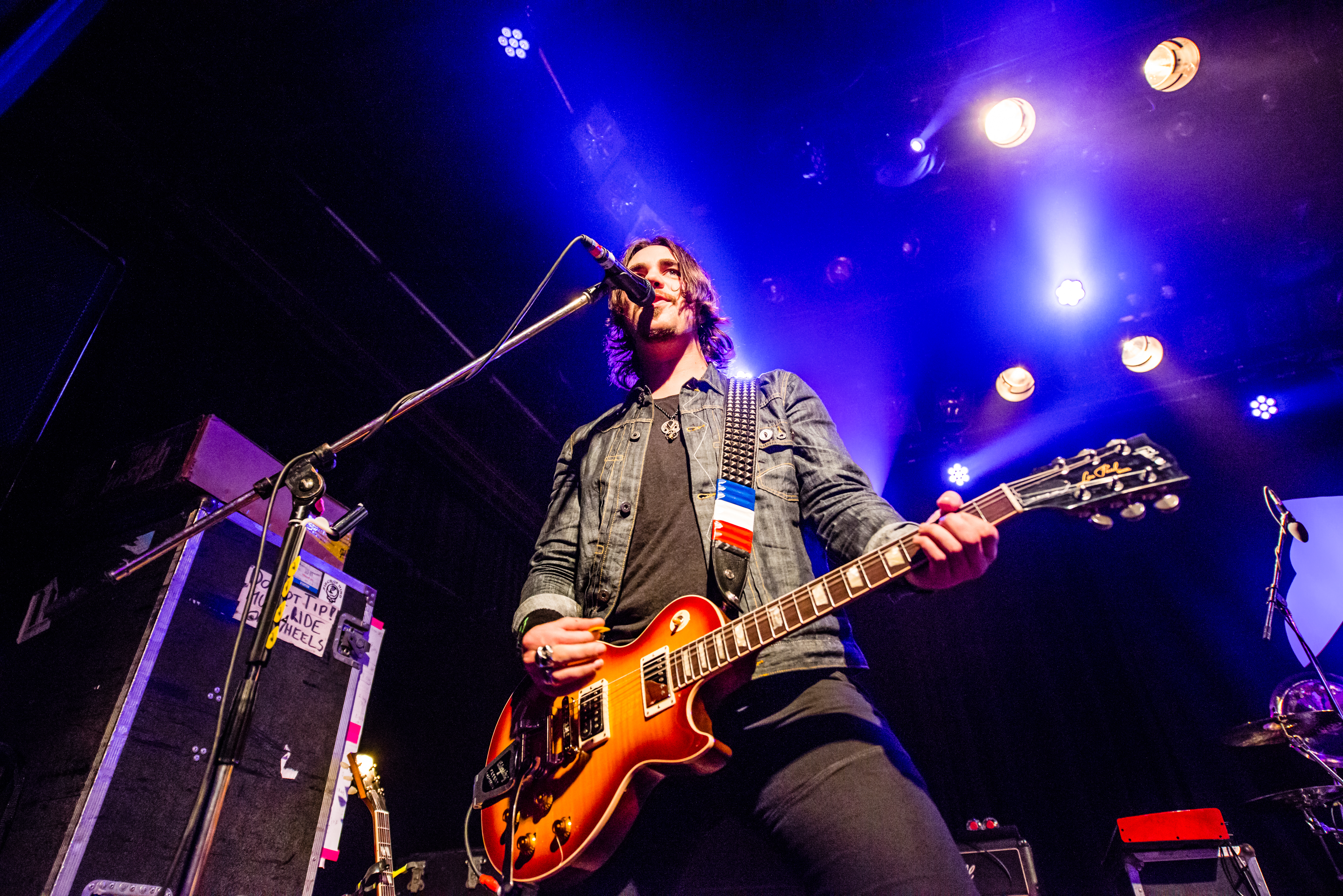 'Halestorm Into the Wild Life Tour - Bochum Zeche'